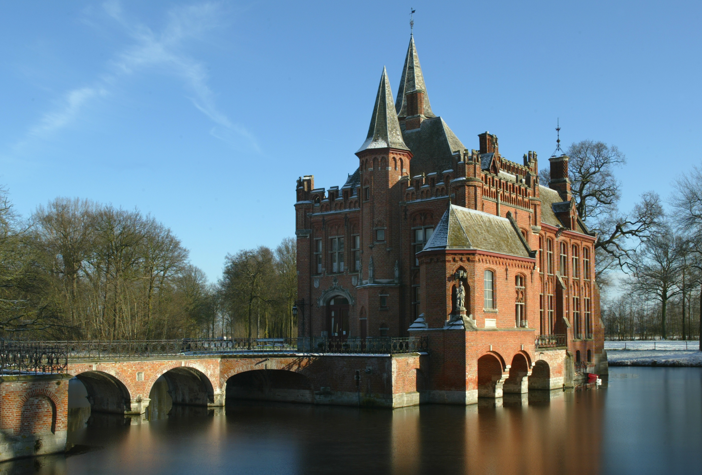 Kasteel 'Ten Berge' te Koolkerke This is a possible Onroerend Erfgoed: Find the monument in the Monuments database: Dudzeelse Steenweg 311 in Brugge All Onroerend Erfgoed in Brugge Is this Onroerend Erfgoed? Yes No More images to work at in Category:Possible onroerend erfgoed.